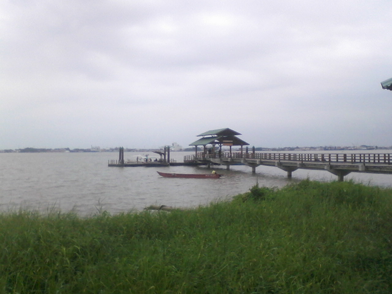 Muelle de la Isla Santay